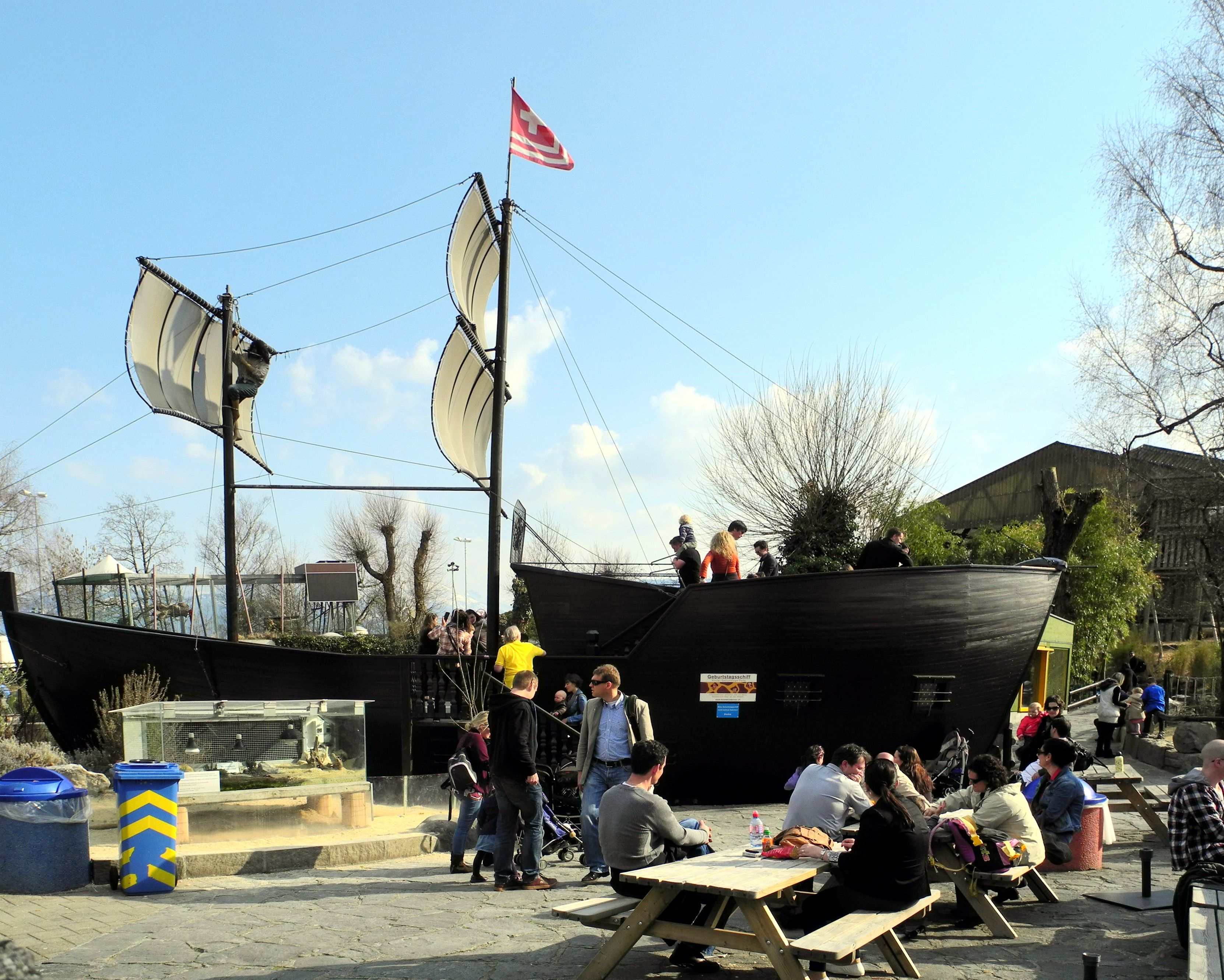 Knie's Kinderzoo in Rapperswil (Switzerland)